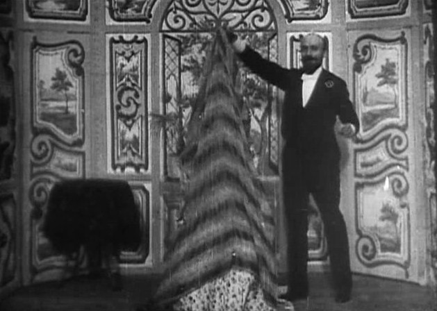 Méliès, Escamotage d'une dame chez Robert-Houdin (Star Film 70, 1896)